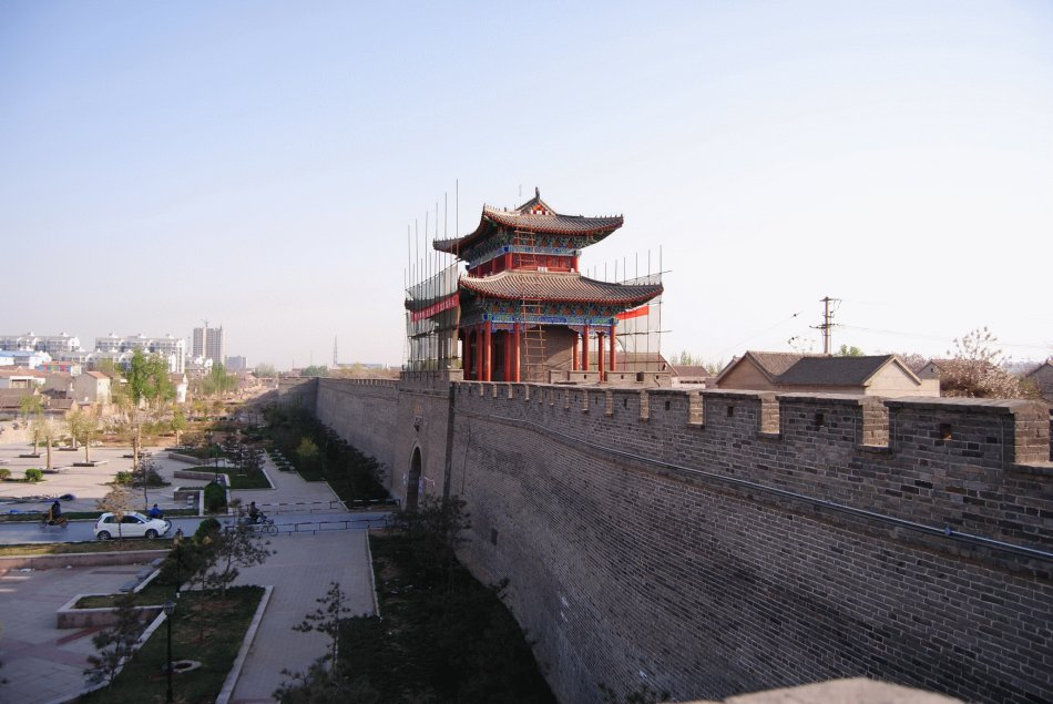 大名县古城建于1401年，目前尚存四座城门，整个城墙下石上砖，庄重高大，雄浑古朴。城墙基本呈正方形，外长4232.9米，里长4135米，城高连垛口13米，女墙高1米，下宽8.33米，上宽4.12米；炮台36座。护城河深15米，宽30米。